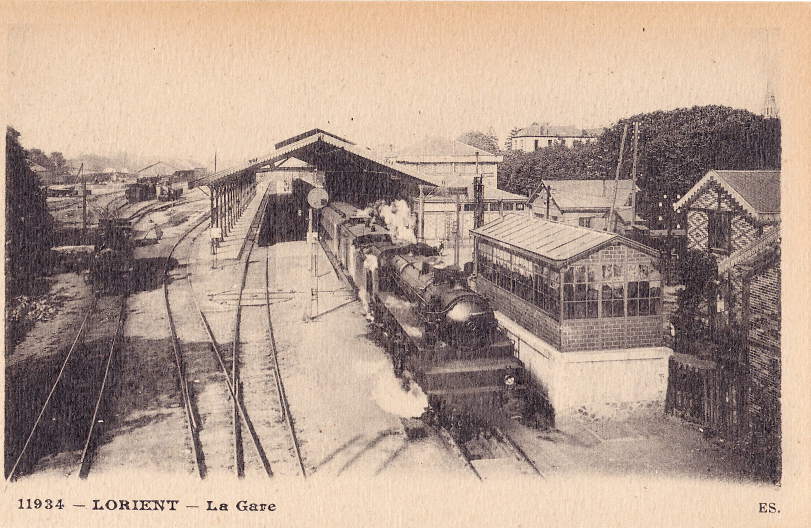 Carte postale ancienne éditée par ES, n°11934 : LORIENT - La Gare